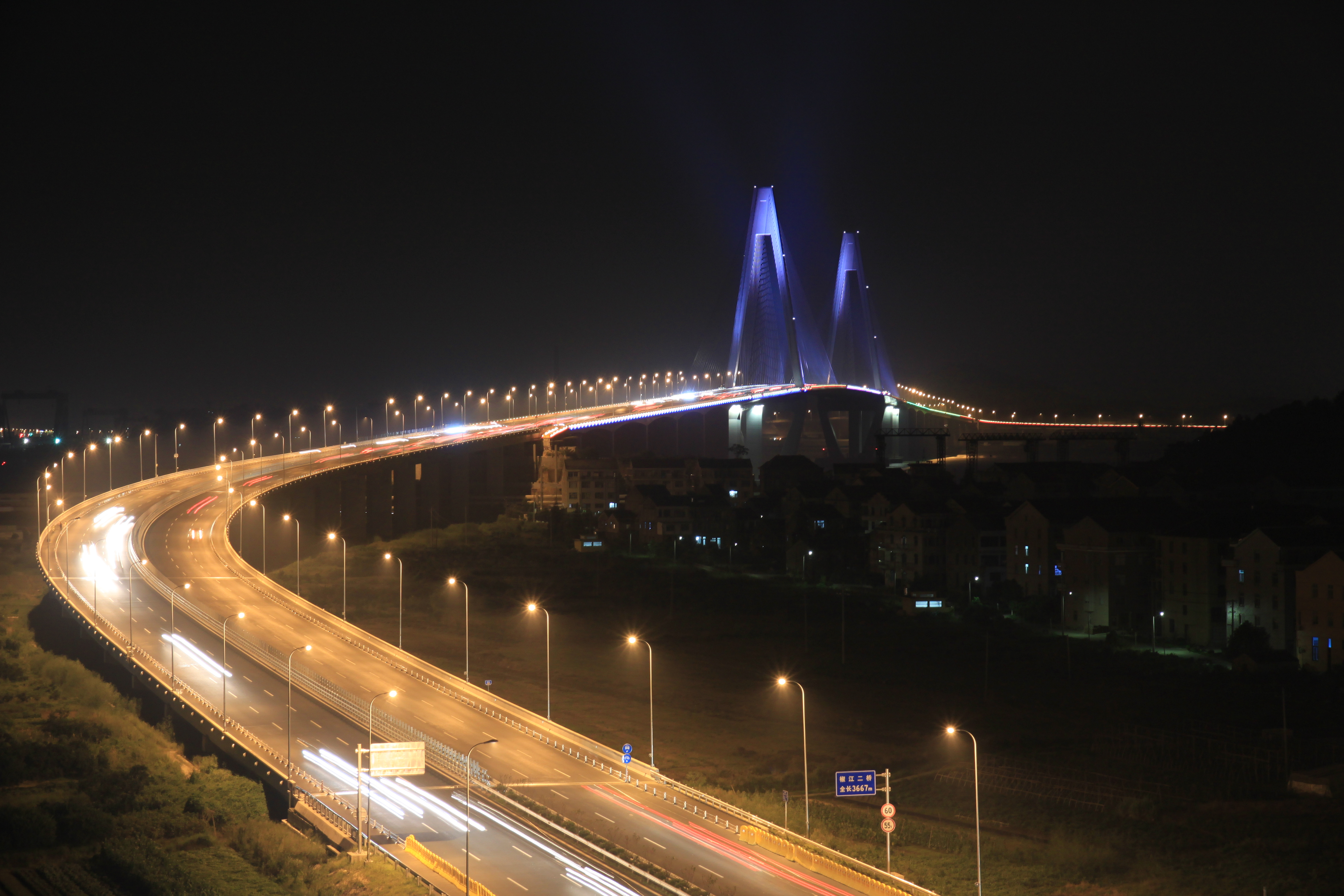 中文（中国大陆）: 椒江二桥夜景